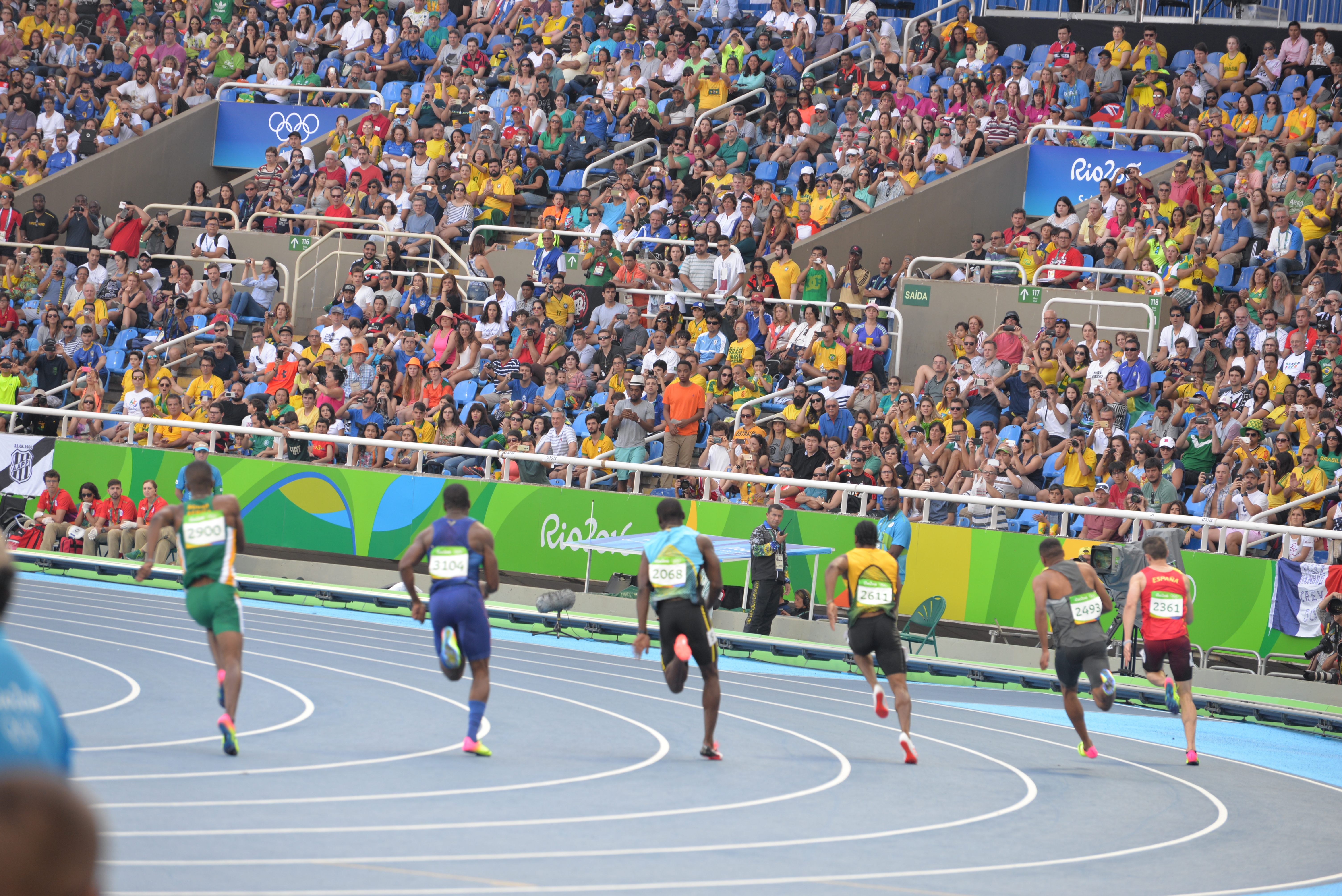 Séries du 200m Homme aux JO de Rio 2016